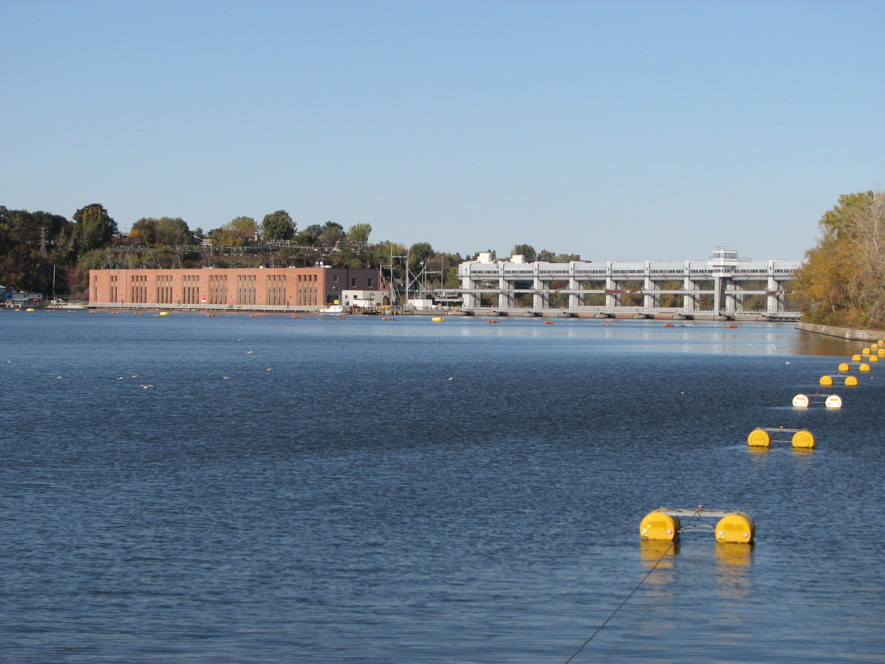 Centrale hydro-électrique de la rivière des Prairies (Montréal)